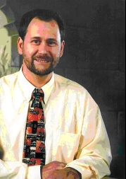 A jpg-picture showing Mr. Thomas Katter for his site at wikipedia.